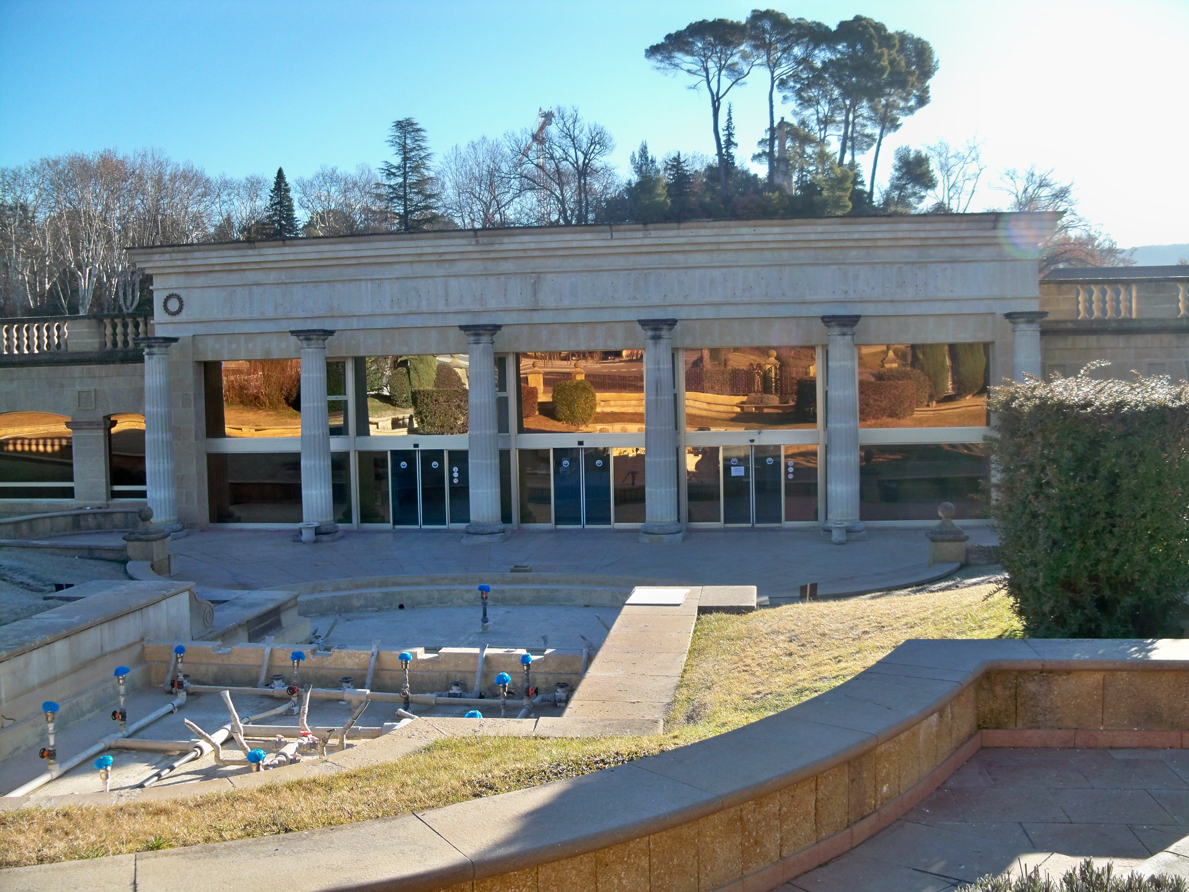 entrée principale des termes de Gréoux les Bains (04), France